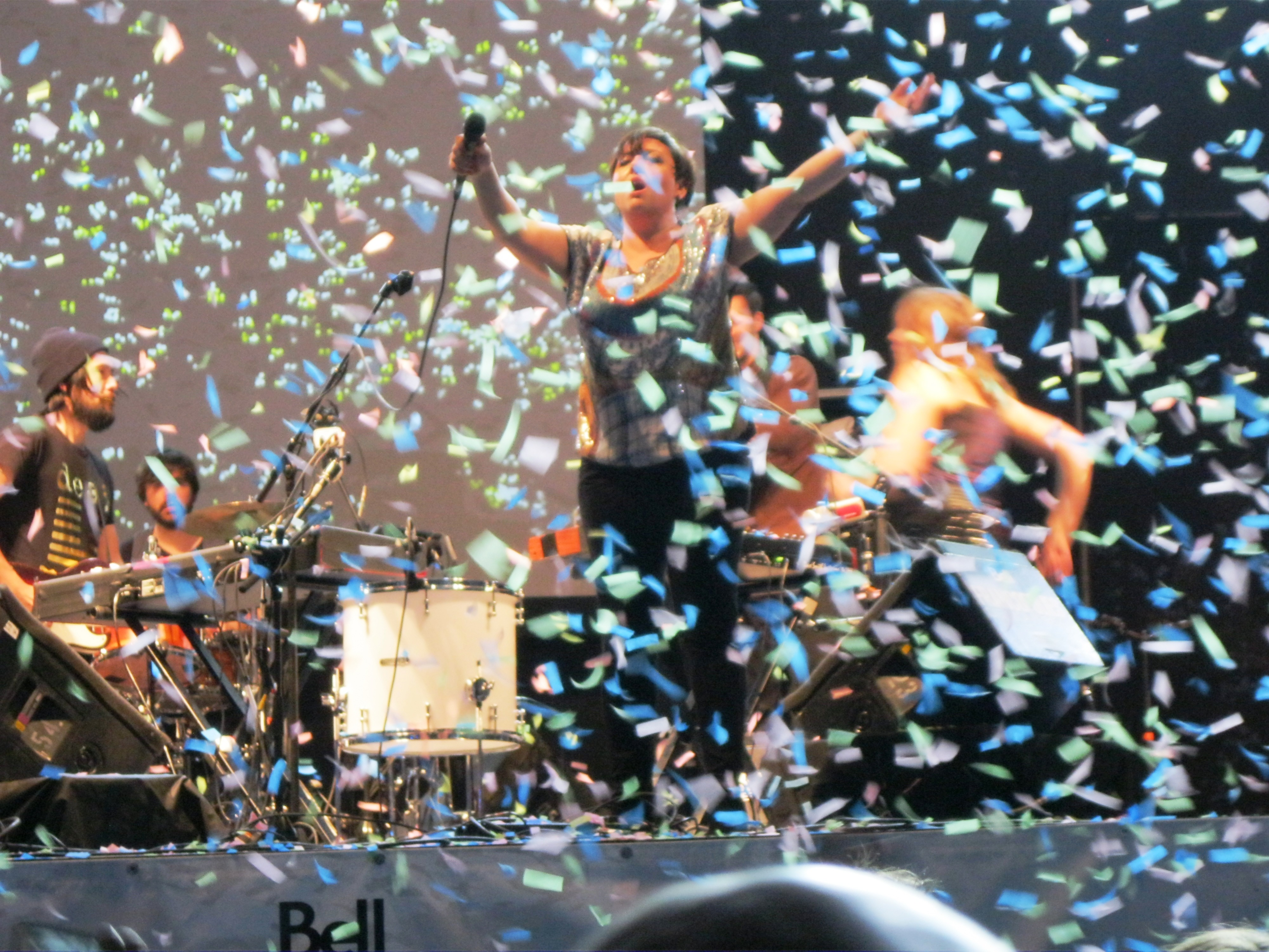 Ariane Moffatt est la vedette du spectacle d'ouverture des FrancoFolies de Montréal, le 13 juin 2013, sur la scène, rue Sainte-Catherine.